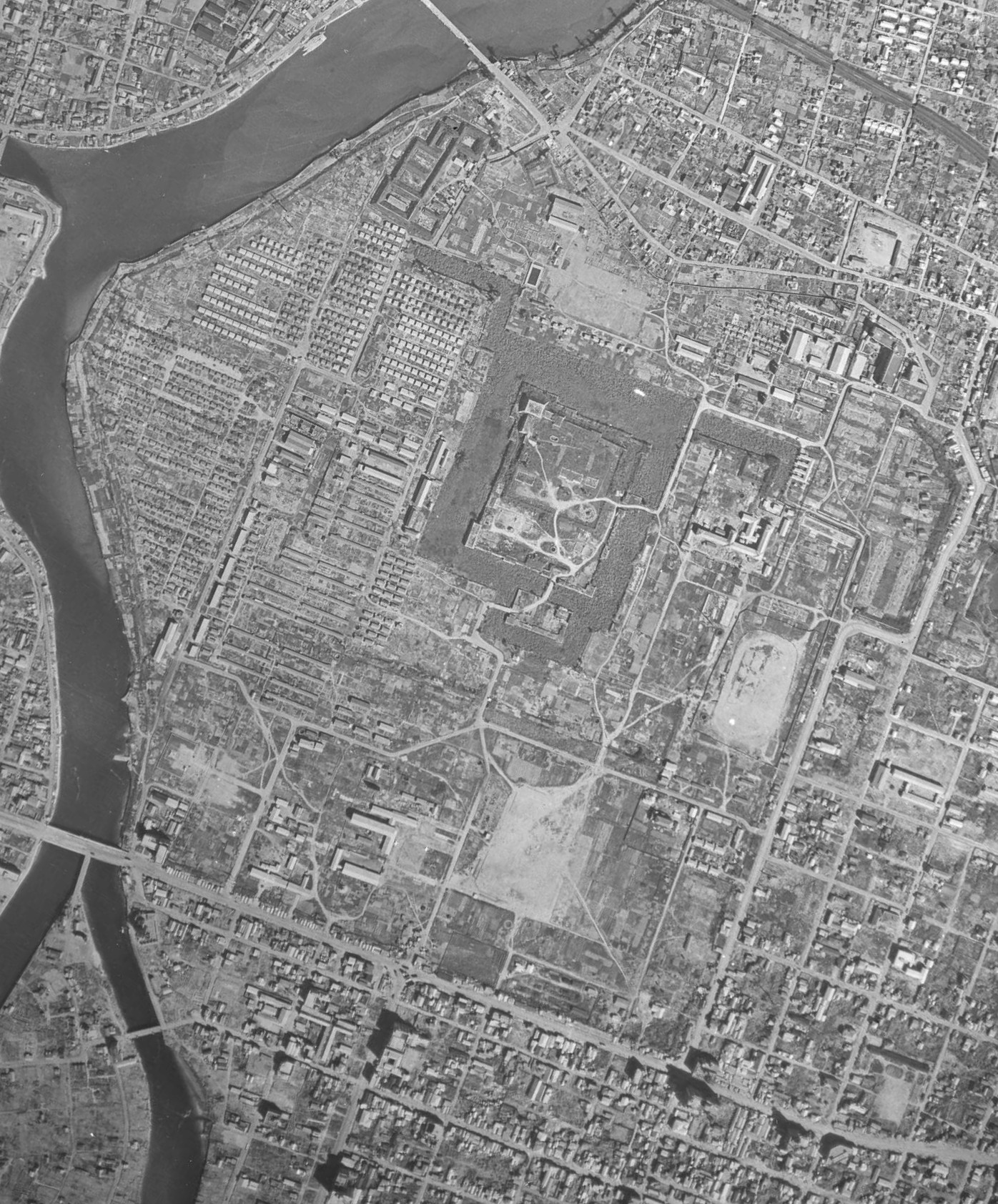 1947年広島市中区基町